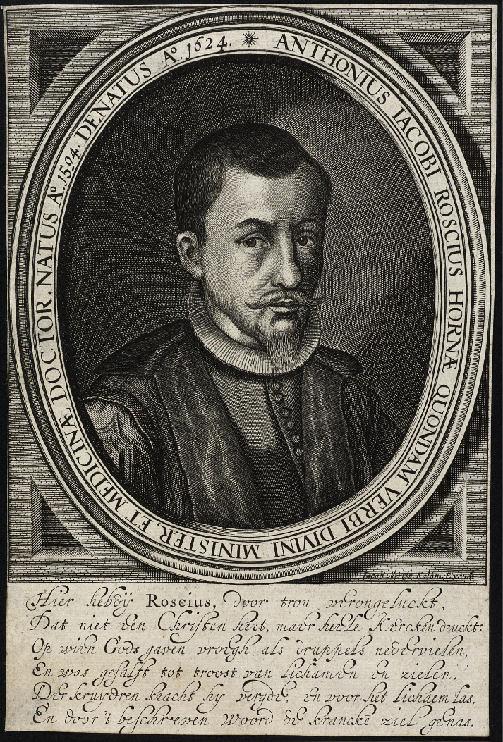 Titel: "Anthonius Iacobi Roscius hornæ quondam verbi divini minister, et medicinæ doctor, natus A°. 1594, denatus A°. 1624"